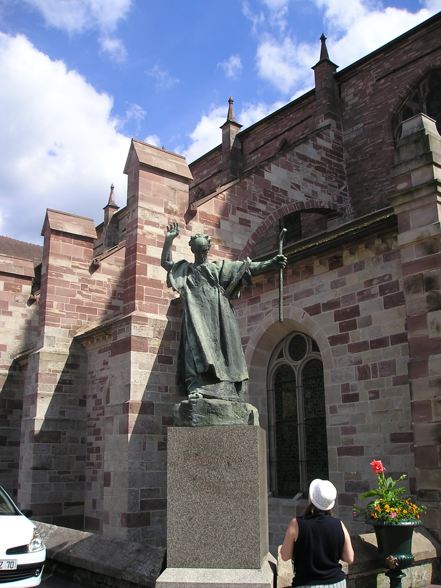 Ehem. Kloster Luxeuil, Columban-Denkmal